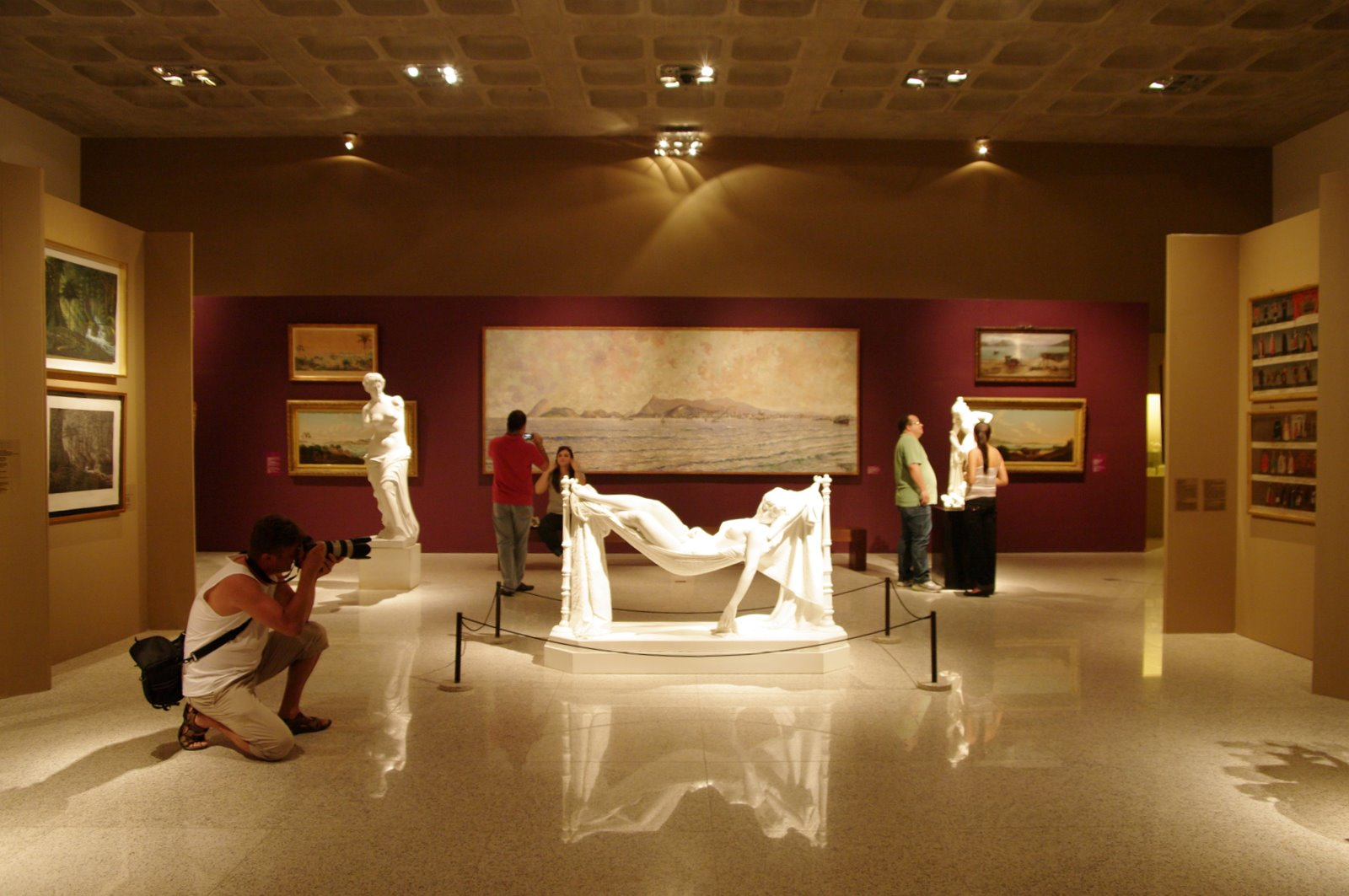 Interior of the Instituto Ricardo Brennand.